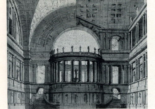 Гонзага, храм Аполлона: Ескіз декорації з двома варіантами склепінь